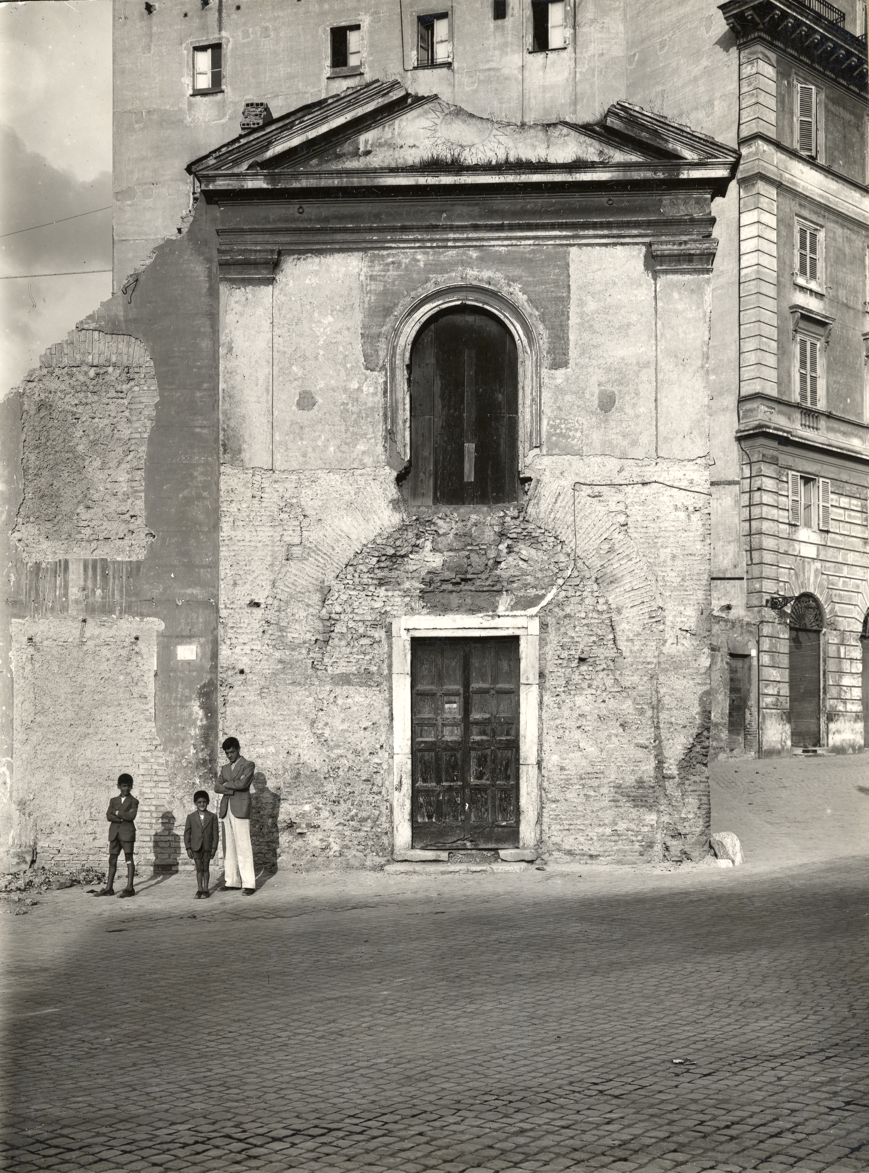 Chiesa distrutta di Sant'Aniano dei Ciabattini